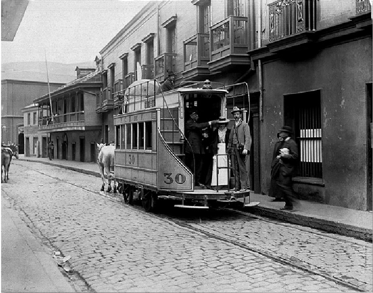 El fotógrafo estadounidense H.G. Olds en el pescante de un tranvia n30. Valparaiso 1899